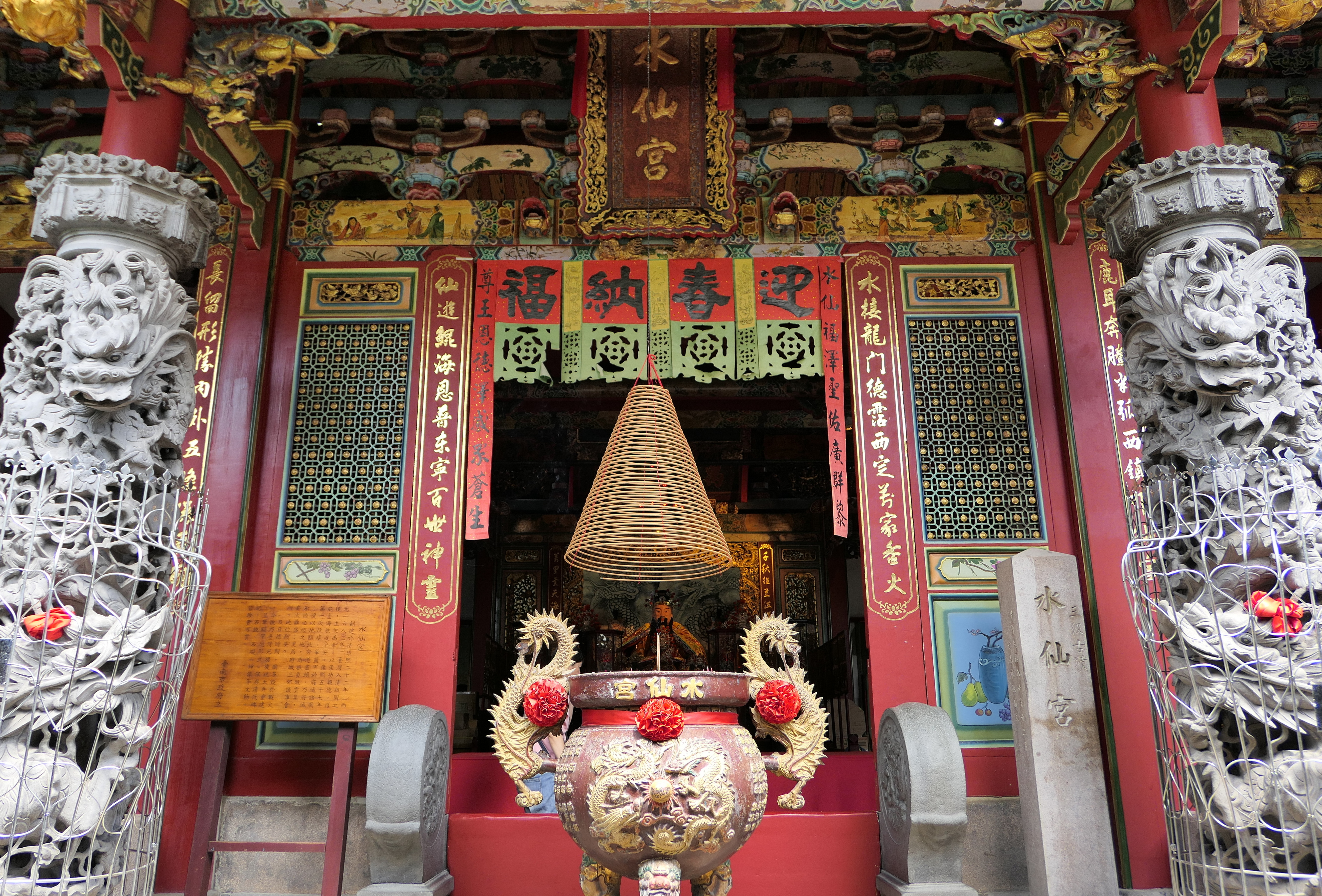 2019年的臺南水仙宮，已整修完成。